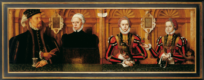 Familienbild des Grafen Johann II Rietberg